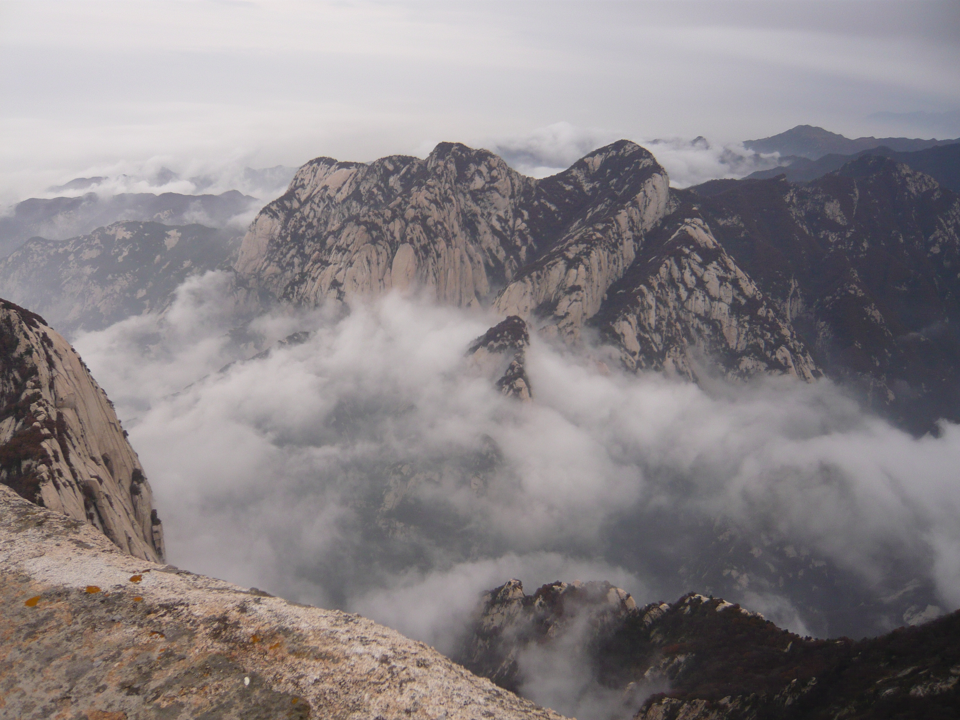 华山风景